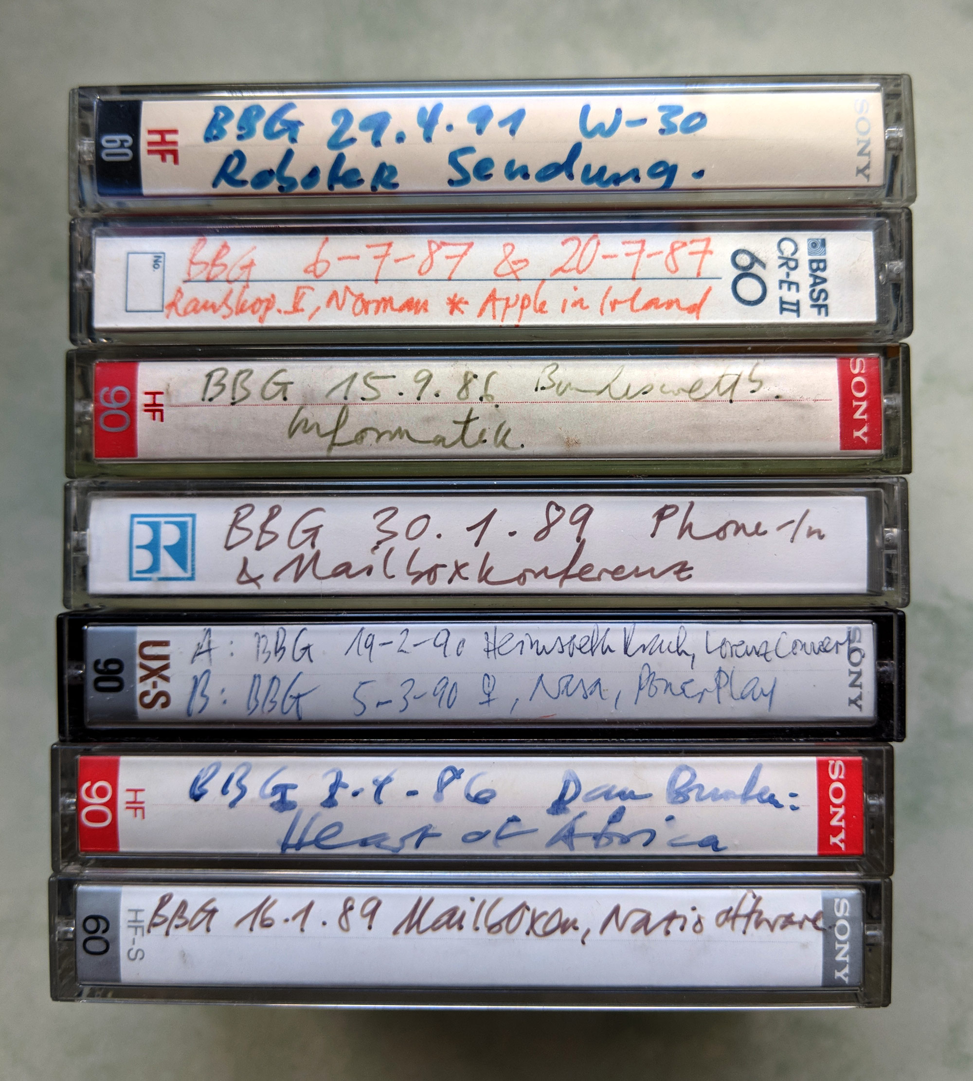 Diverse private Mitschnitte der Rundfunksendung "Bit, byte, hebissen" im zweiten Programm des Bayerischen Rundfunks. Die Cassetten, zufällig aus meinem Archiv ausgewählt, von oben nach unten: 29. April 1991: W-30 Sampler; Roboter 6. und 20. Juli 1987: Raubkopien C64, Besuch bei Apple in Irland 15. September 1986: Der Bundeswettbewerb Informatik 30. Januar 1989: Mailbox-Live-Chat mit Phone-Ins 19. Februar und 5. März 1990: Krach bei TurboPascal-Entwickler Heimsoeth; Frauen in der IT, NASA-Software, Power Play Computerspiel 7. April 1986: Dan Bunten stellt sein Spiel Heart of Africa vor. 16. Januar 1989: Politische Mailboxen (wie LinkM), Chats; Nazi-Software